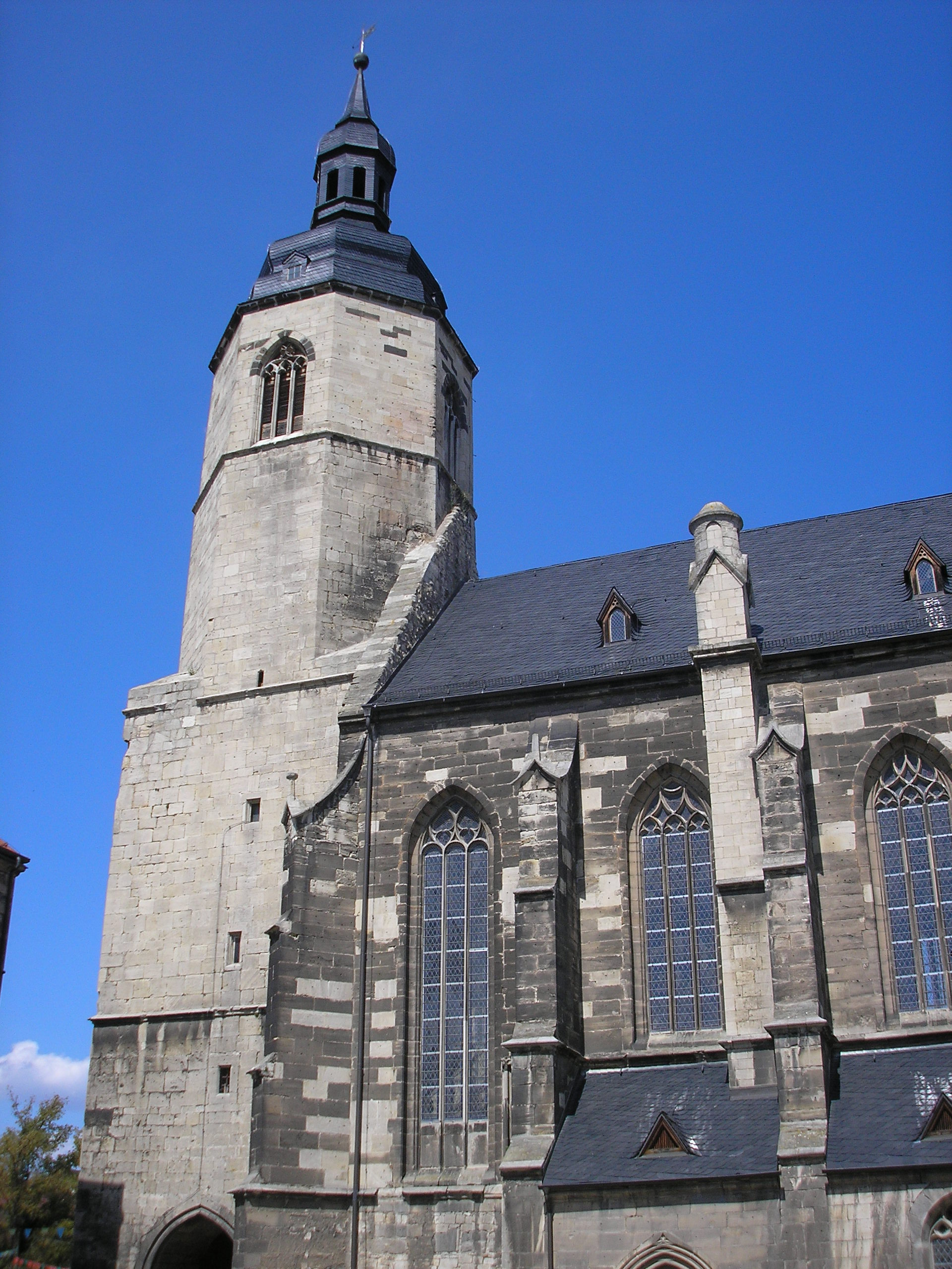 Die Stadtkirche in Laucha (Sachsen-Anhalt).